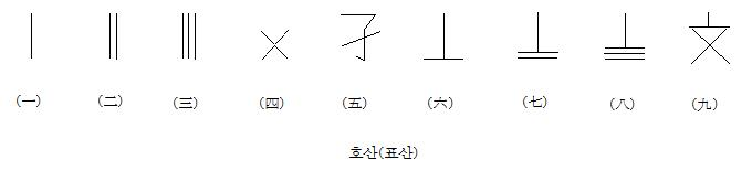 이 그림은 호산이라고 불리는 숫자를 나타낸 그림입니다.